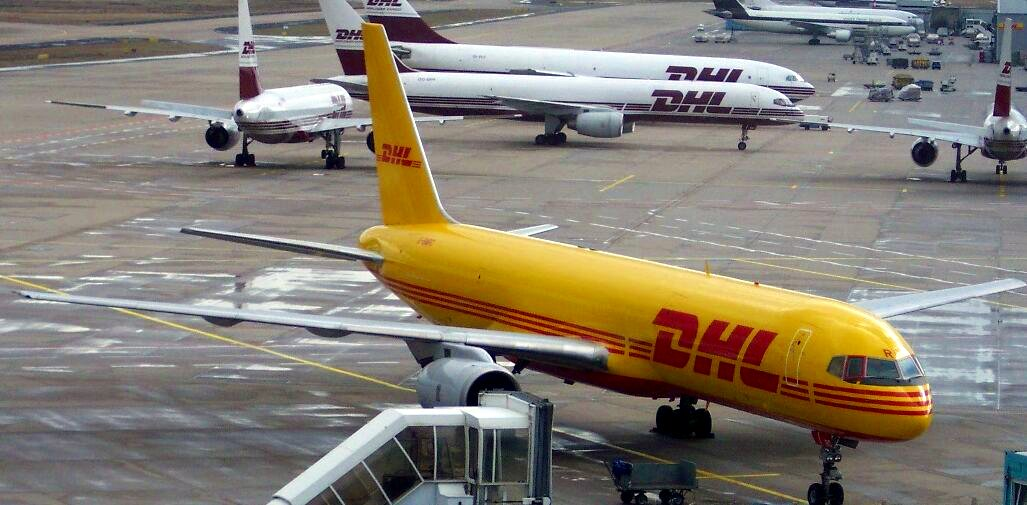 B-757 Frachter, DHL